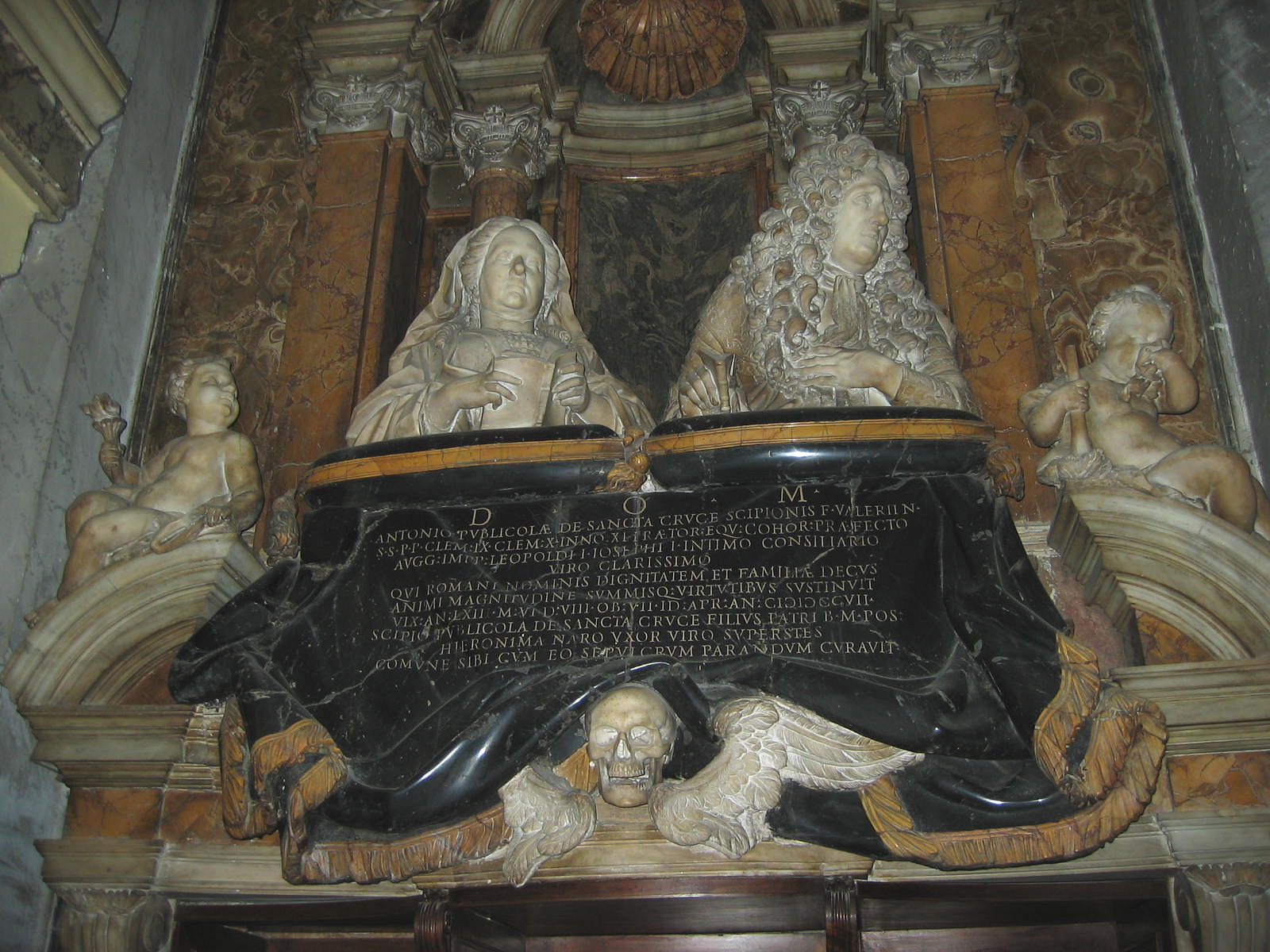 Lorenzo Ottoni: Monument to Antonio Publicola Santacroce and Girolama Nari (1727). Santa Maria in Publicolis, Rome.